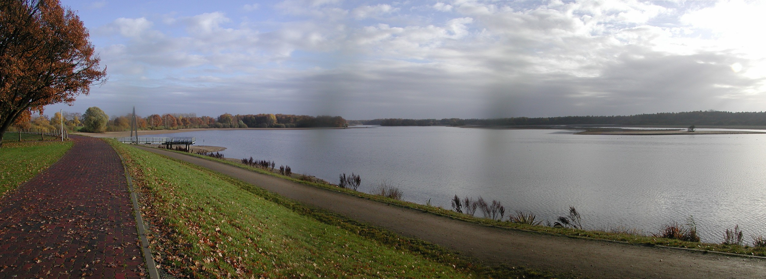 Blick über den Stausee der Thülsfelder Talsperre